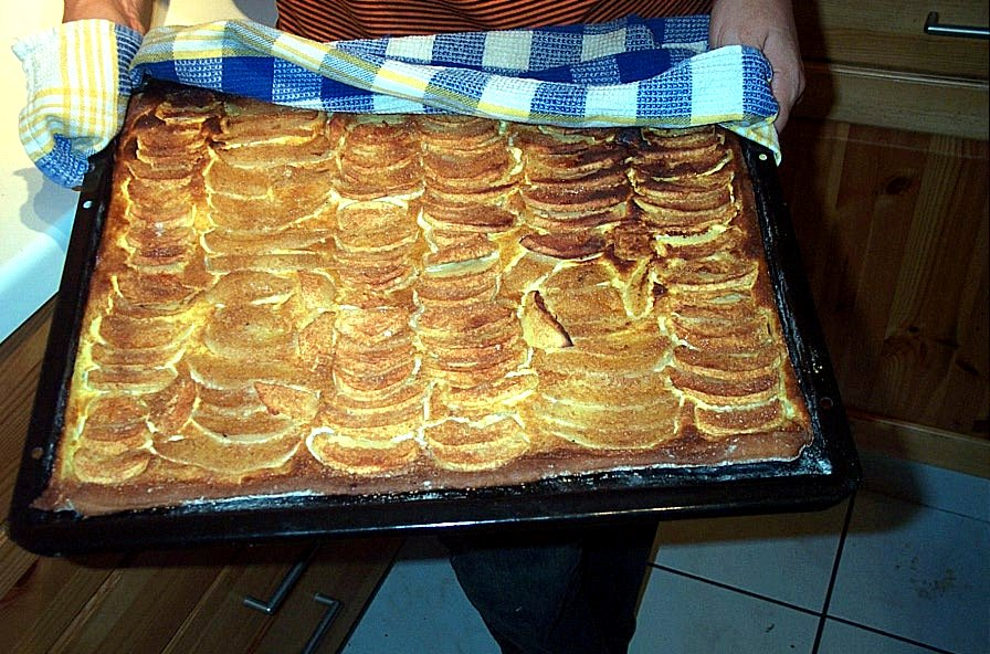 Apfelkuchen, noch heiss vom backen.